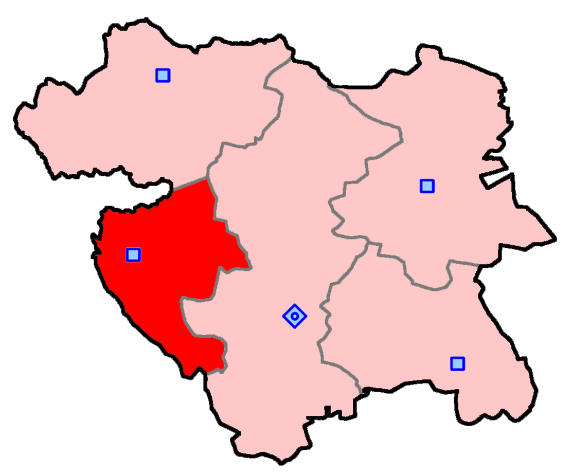 مریوان و سروآباد برای انتخابات مجلس شورای اسلامی